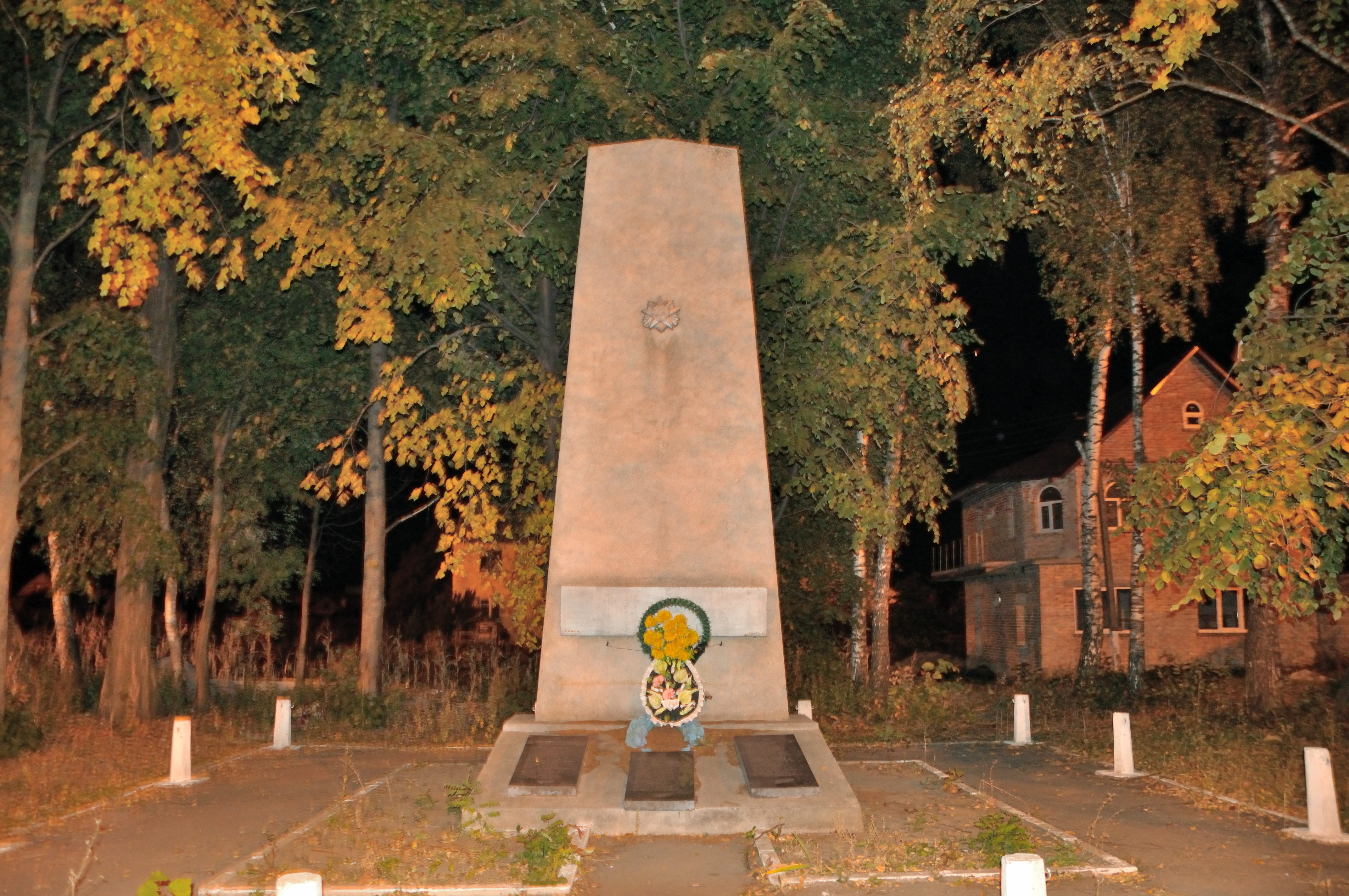 Могила невідомого солдата, с. Горбаків